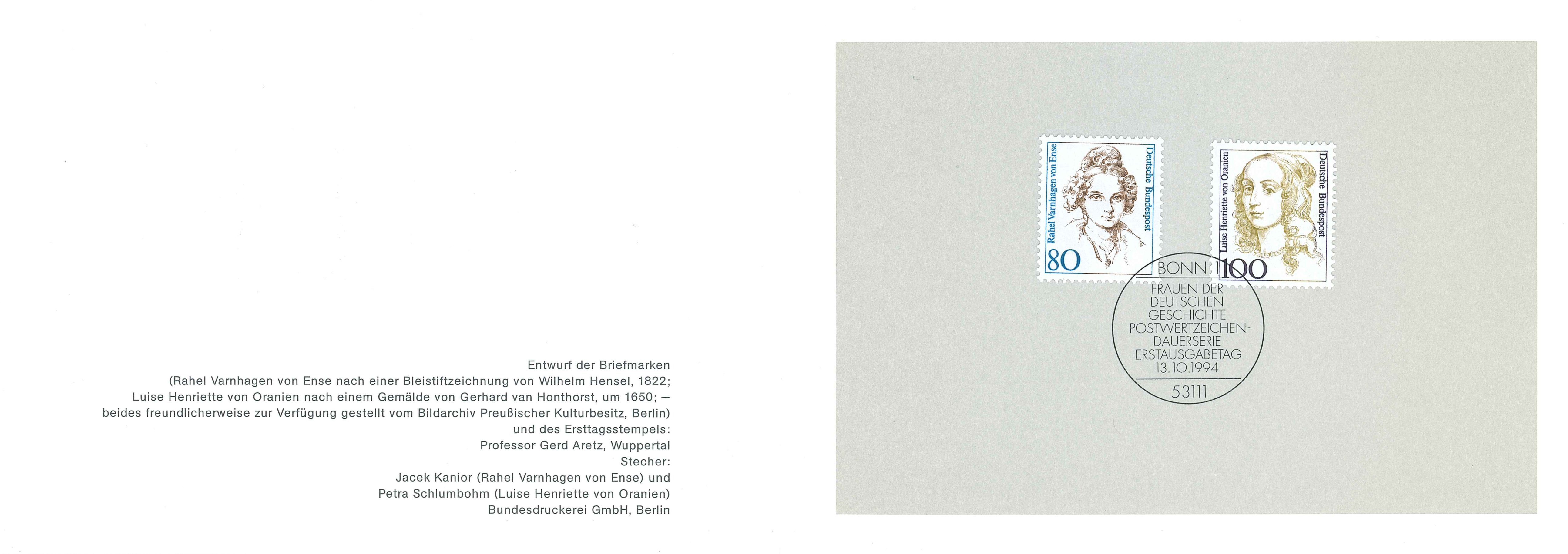 Ersttagsblatt DPAG "Frauen deutscher Geschichte" 13.10.1994